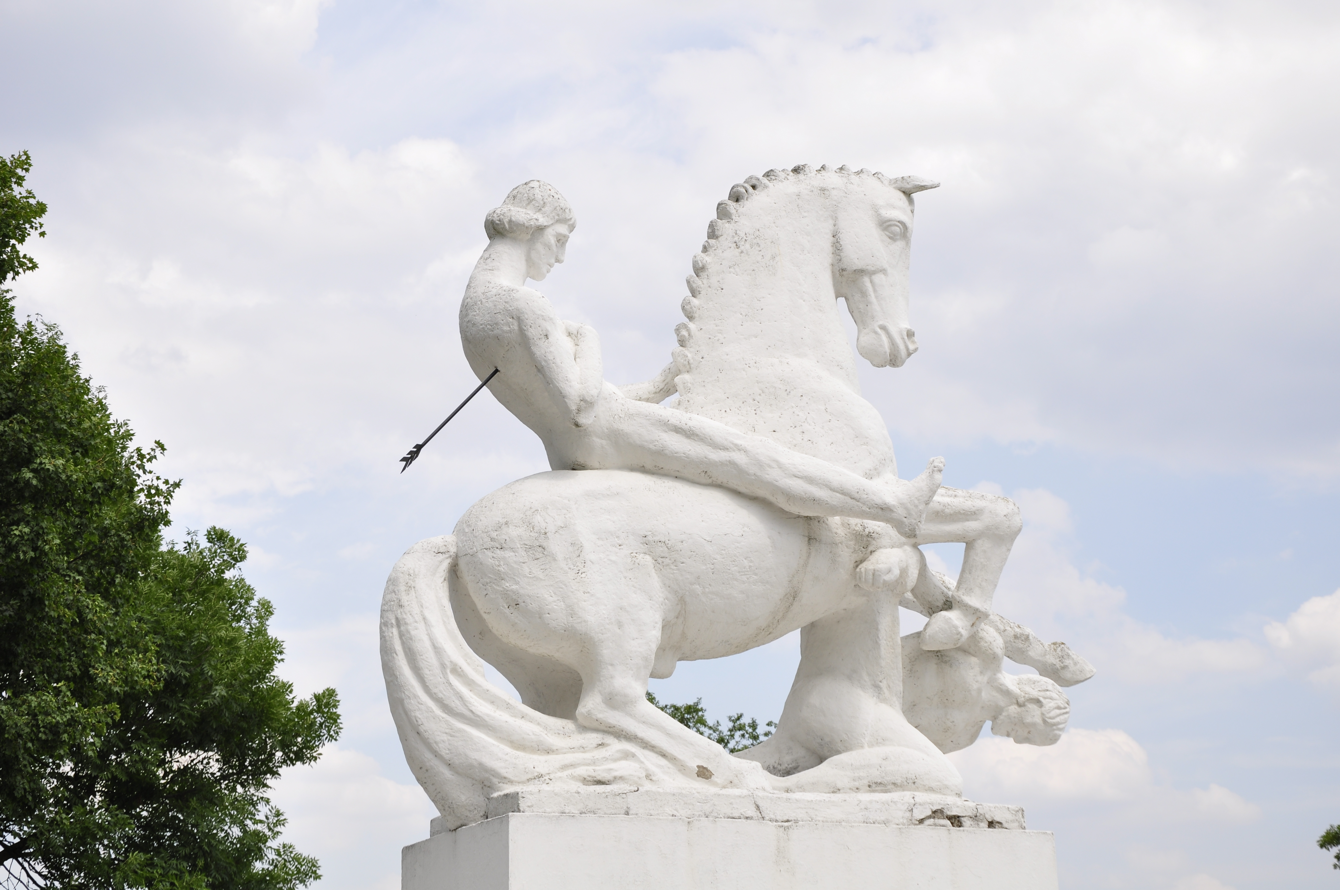 Standbild des Leszek Bialy